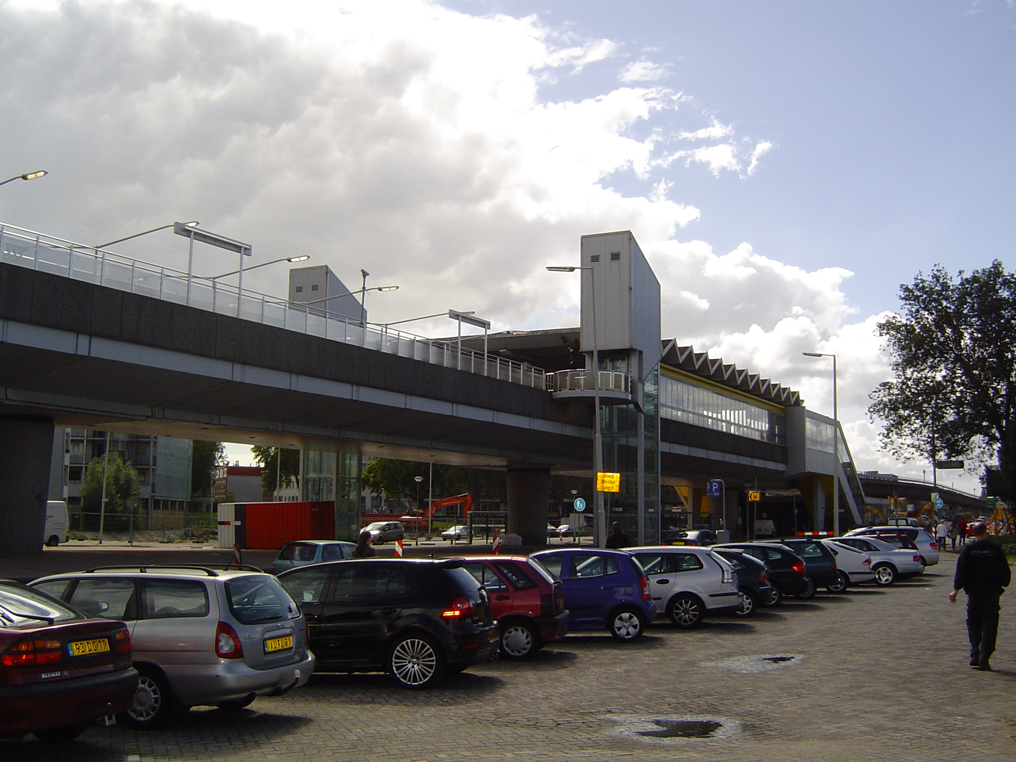 Metrostation Rijnhaven, Rotterdam, the Netherlands.